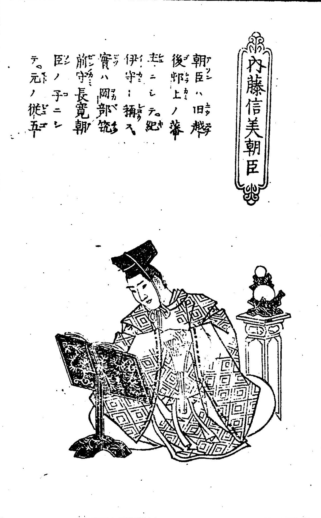 越後村上藩最後の藩主・内藤信美の肖像画。